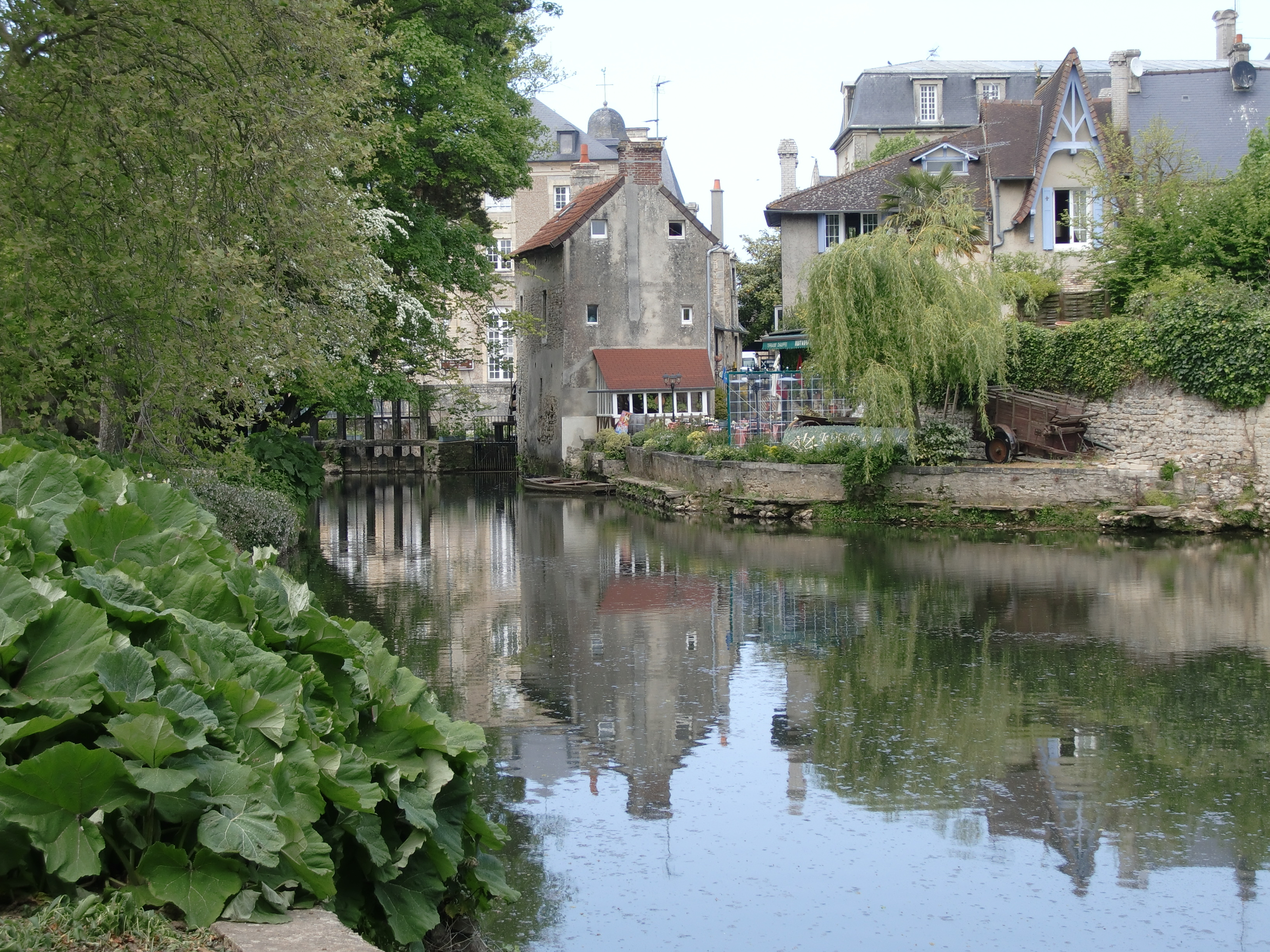 Die Aure in Bayeux